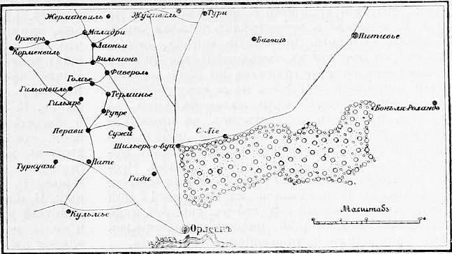 Данное изображение было использовано в статье «Вильпион» опубликованной в шестом томе «Военной энциклопедии», который был издан книгоиздательским товариществом Ивана Дмитриевича Сытина в 1912 году в столице Российской империи городе Санкт-Петербурге.